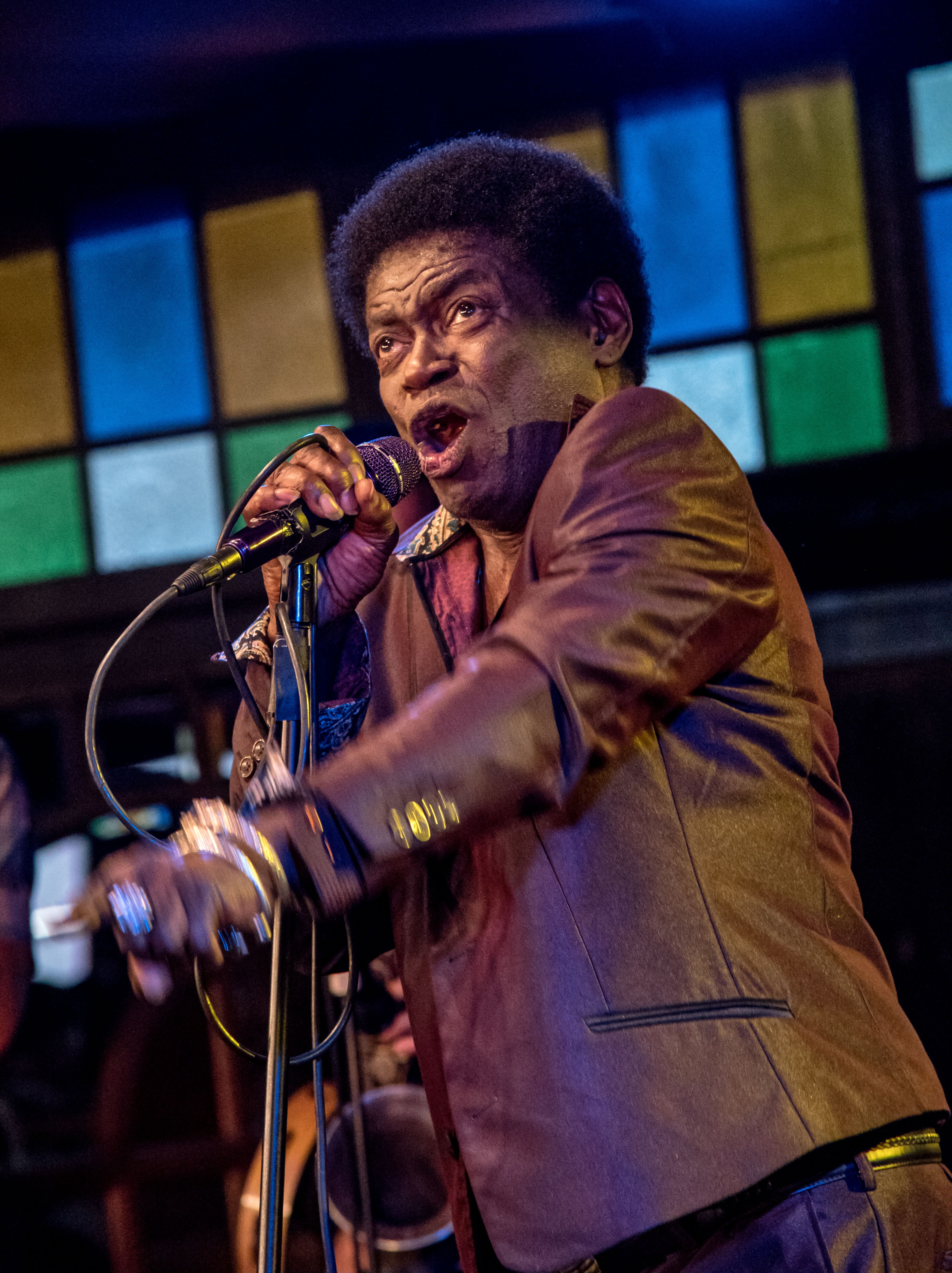 Bilder vom Zelt Musik Festival 2016 in Freiburg im Breisgau Der Soulsänger Charles Bradley